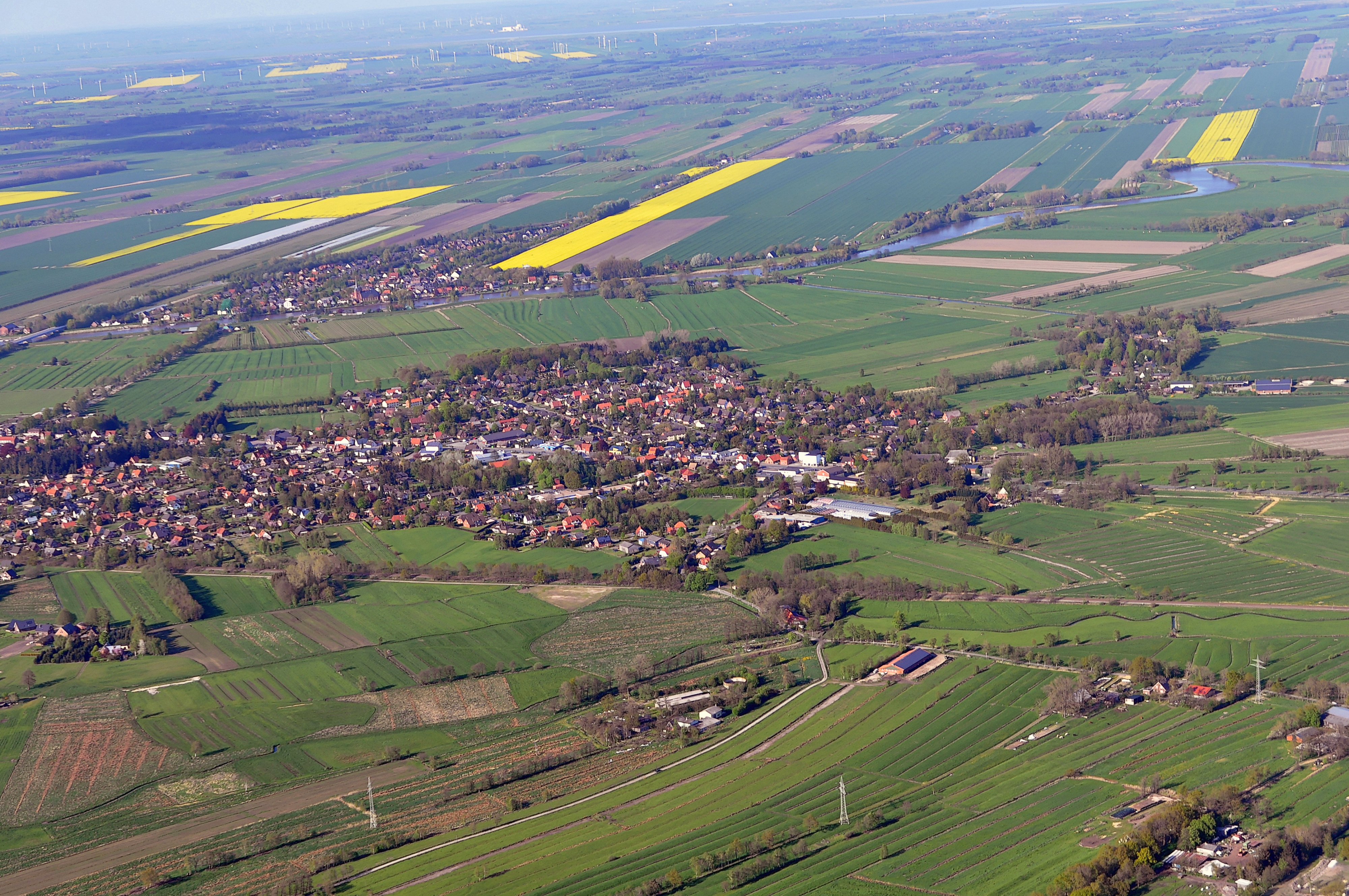 Luftbilder von der Nordseeküste 2012-05